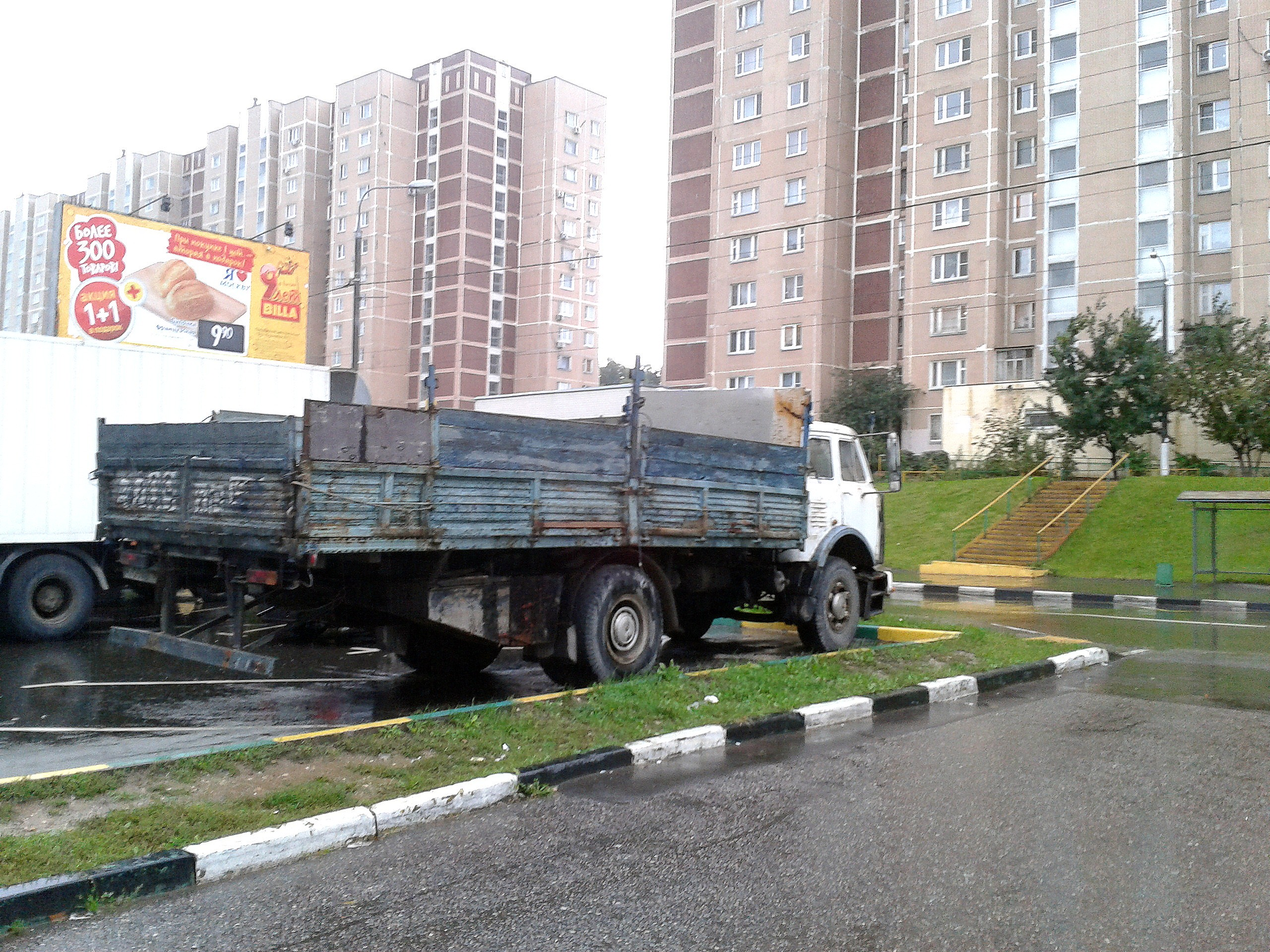 МАЗ-53352.